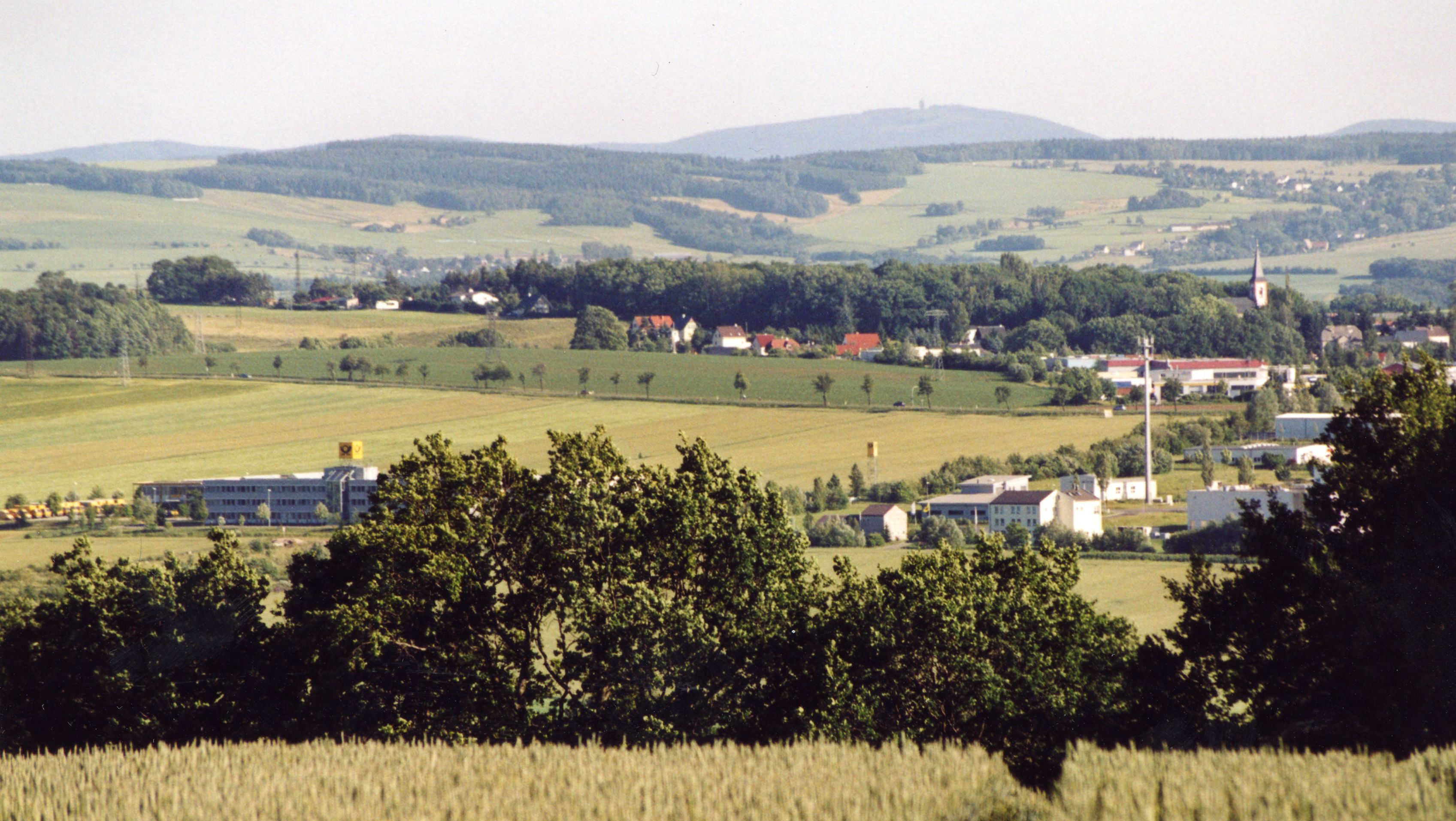 Der 1019 m hohe Auersberg im Erzgebirge, von Reinsdorf aus gesehen. Im Vordergrund Teile des Gewerbegebietes Reinsdorf, rechts die Kirche von Friedrichsgrün.)